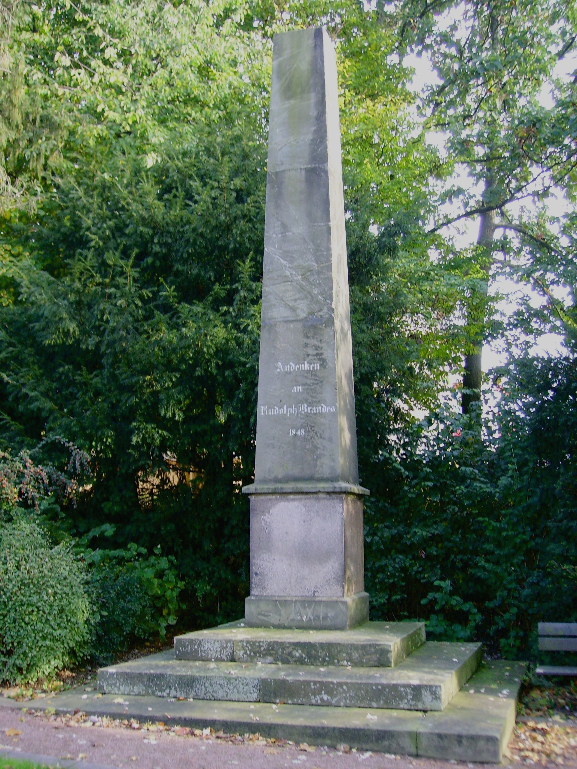 Obelisk vom 18. October 1848 zu Ehren des 1842 verstorbenen Apothekers Rudolph Brandes in Bad Salzuflen